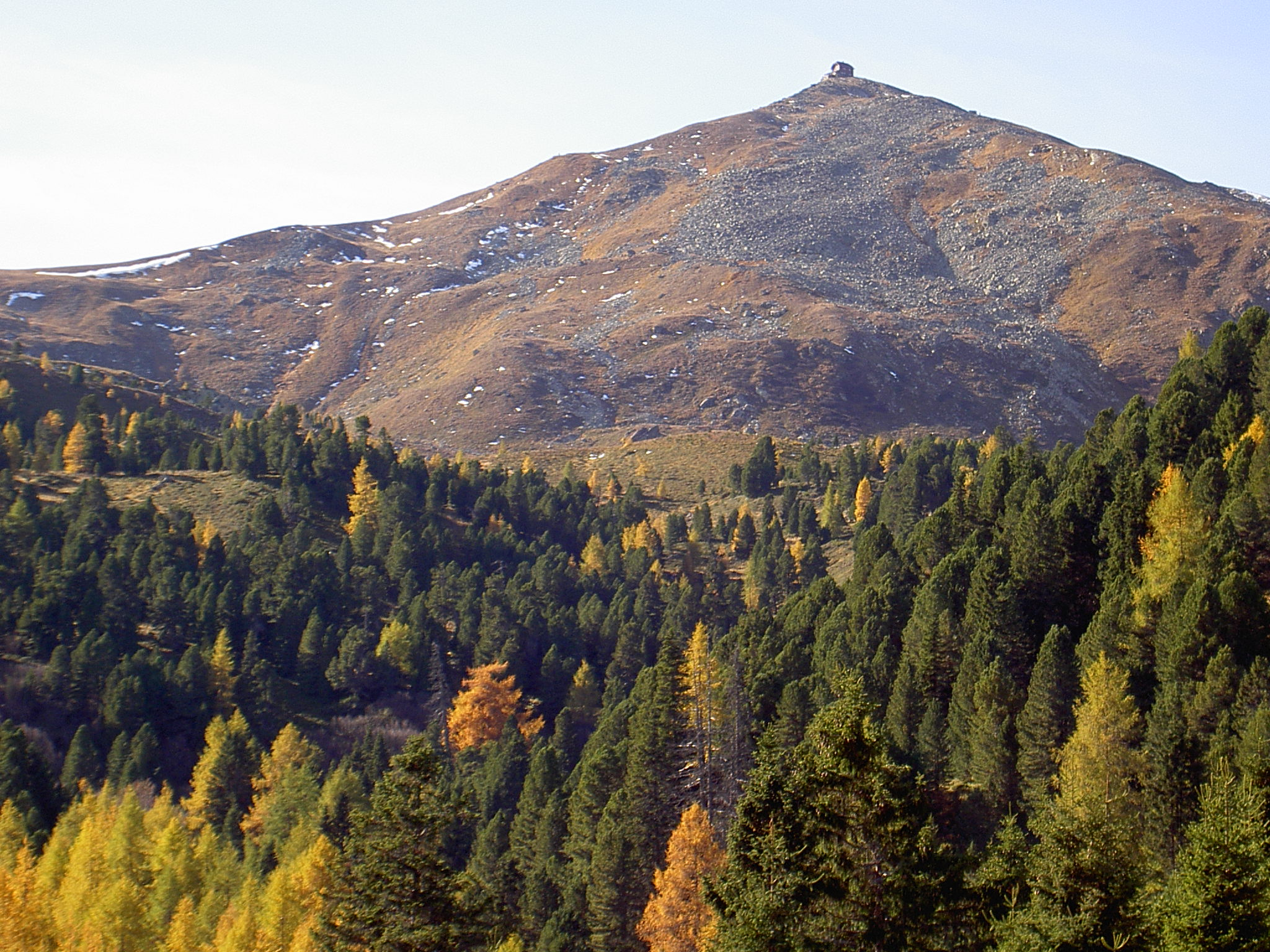 Zirbitzkogel, Steiermark, Österreich; zirbitzkogel, Styria, Austria